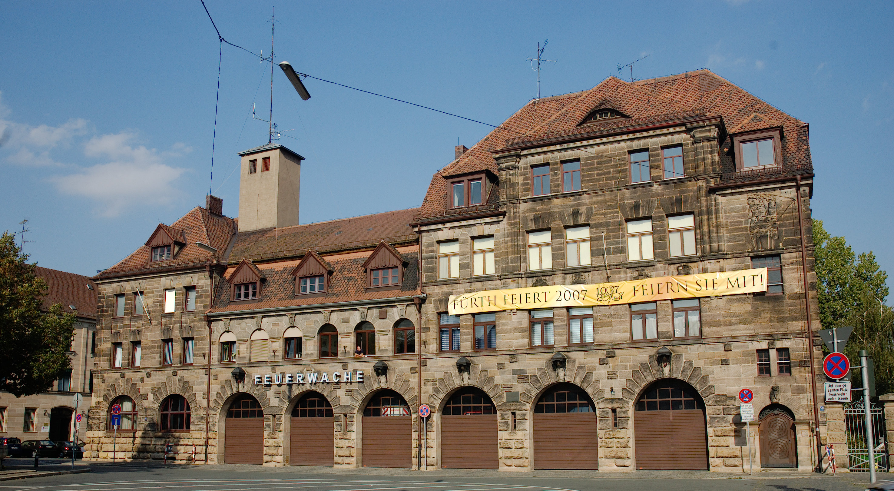 Feuerwache in Fürth